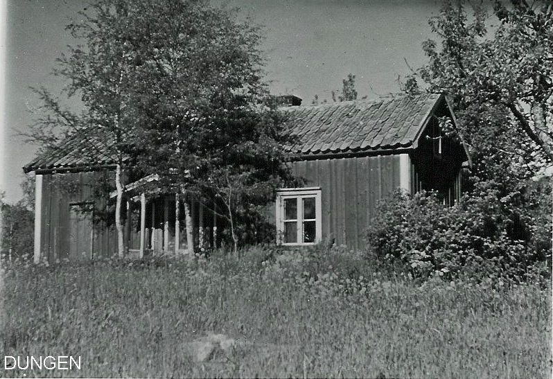 Torpet Dungen i Hakarp.